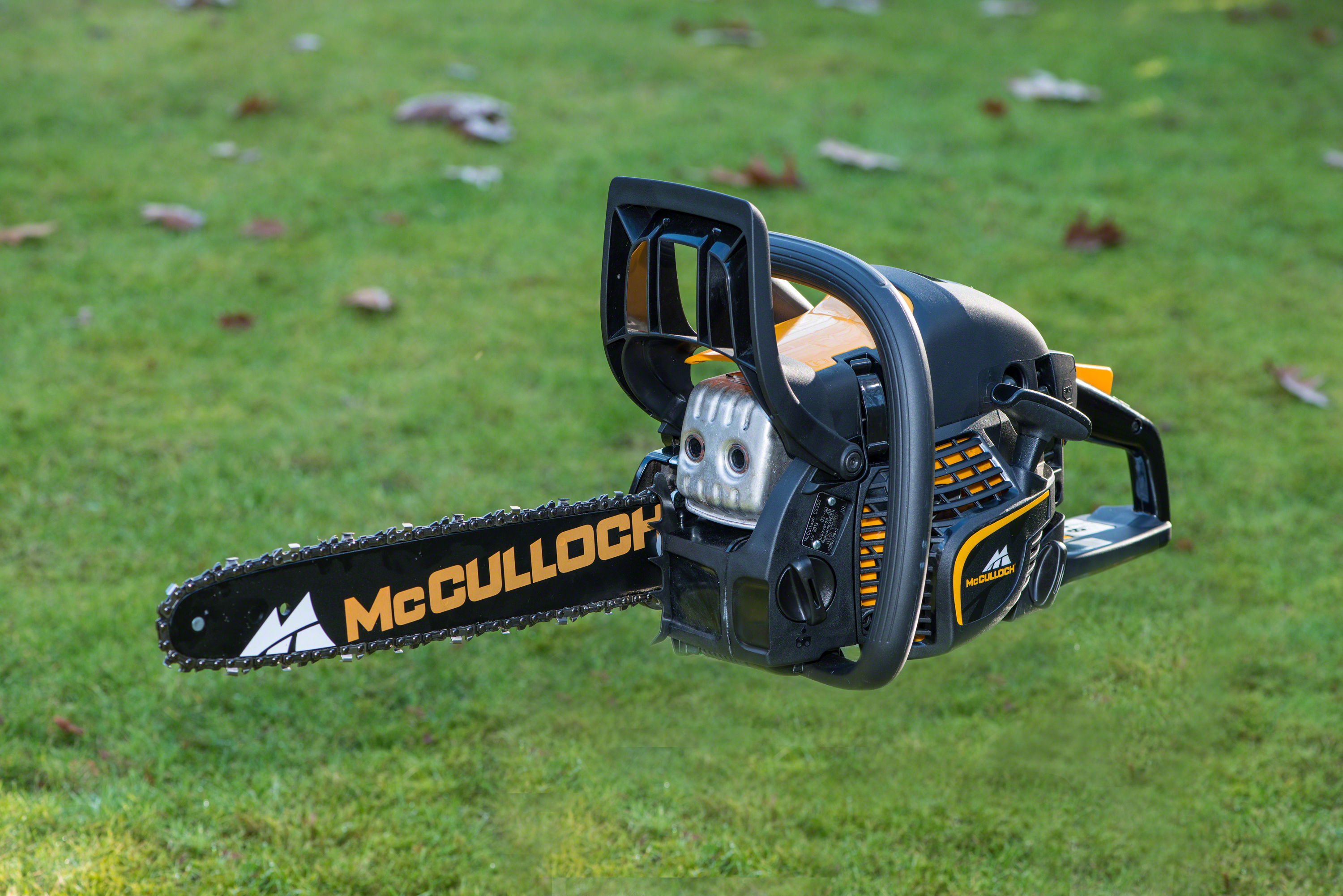 Kettensäge der Marle "McCulloch", CS350